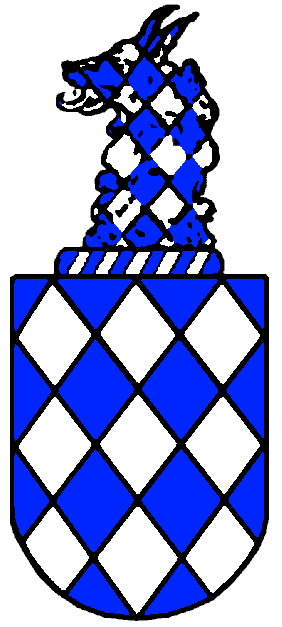 Armas da Familia Filgueira